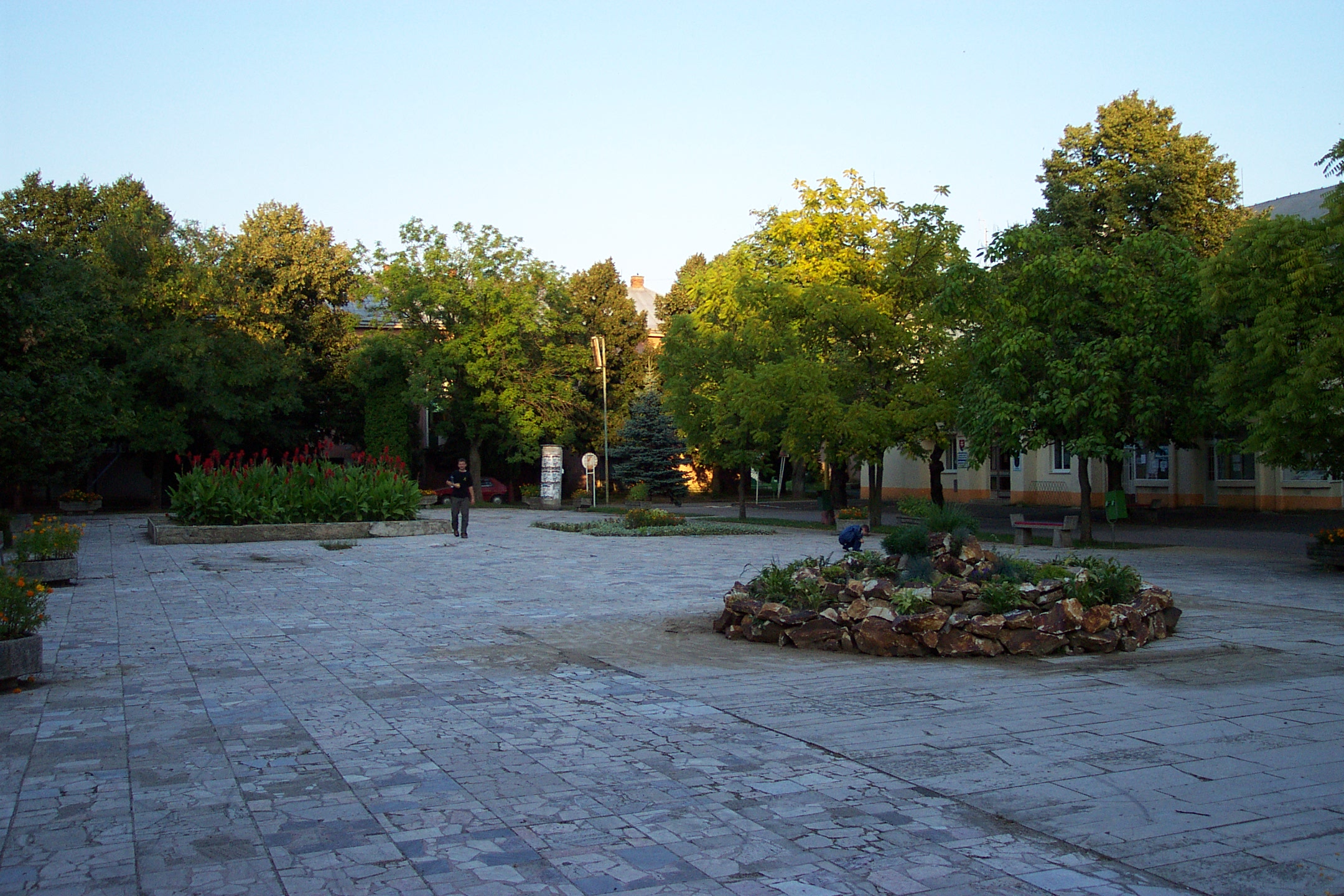 Náměstí Pionýrů v Čierné nad Tisou. Slovensko. Personality rights warningAlthough this work is freely licensed or in the public domain, the person(s) shown may have rights that legally restrict certain re-uses unless those depicted consent to such uses. In these cases, a model release or other evidence of consent could protect you from infringement claims.